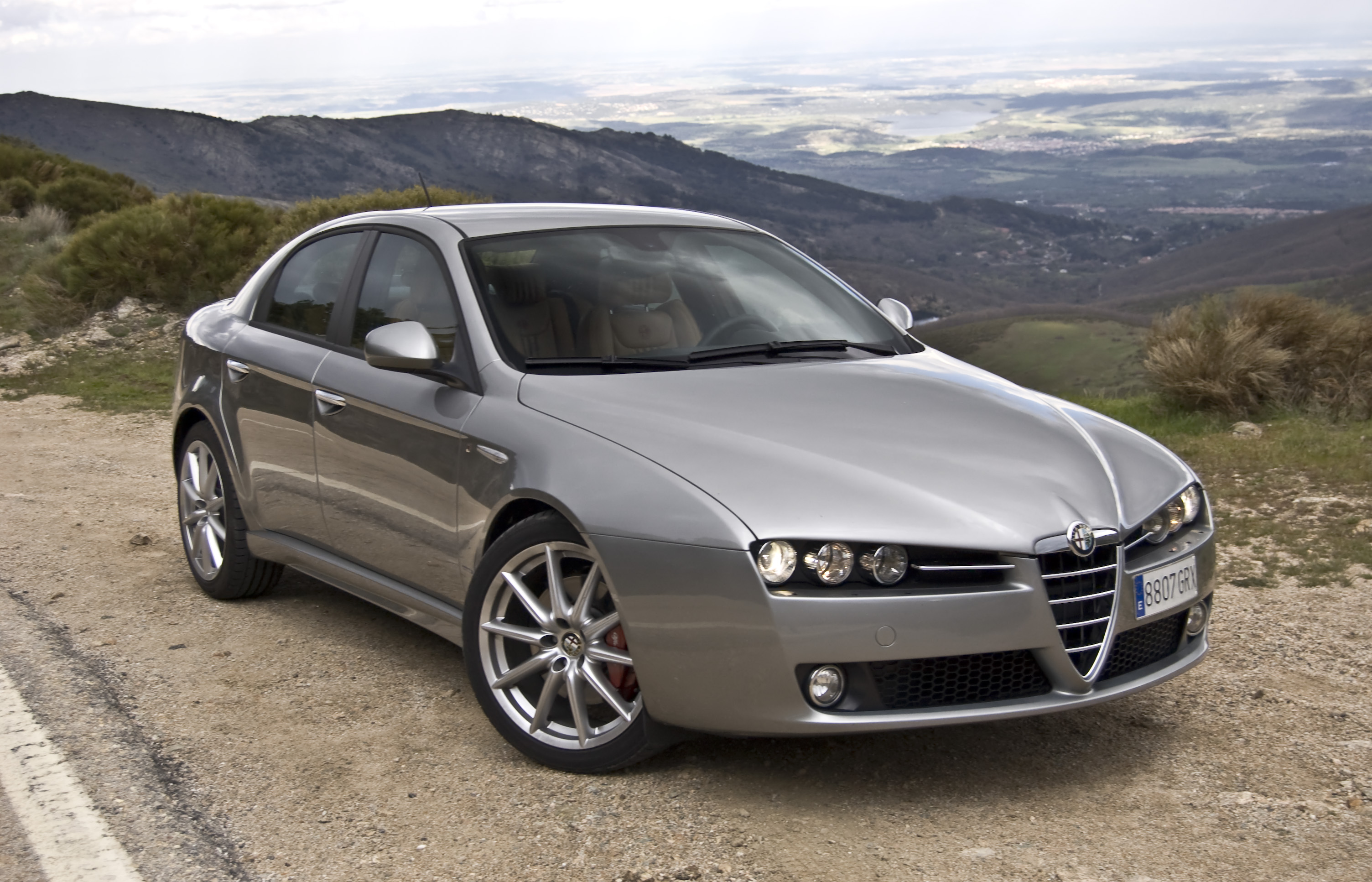 Alfa 159 2.0 JTDm ECO Elegante